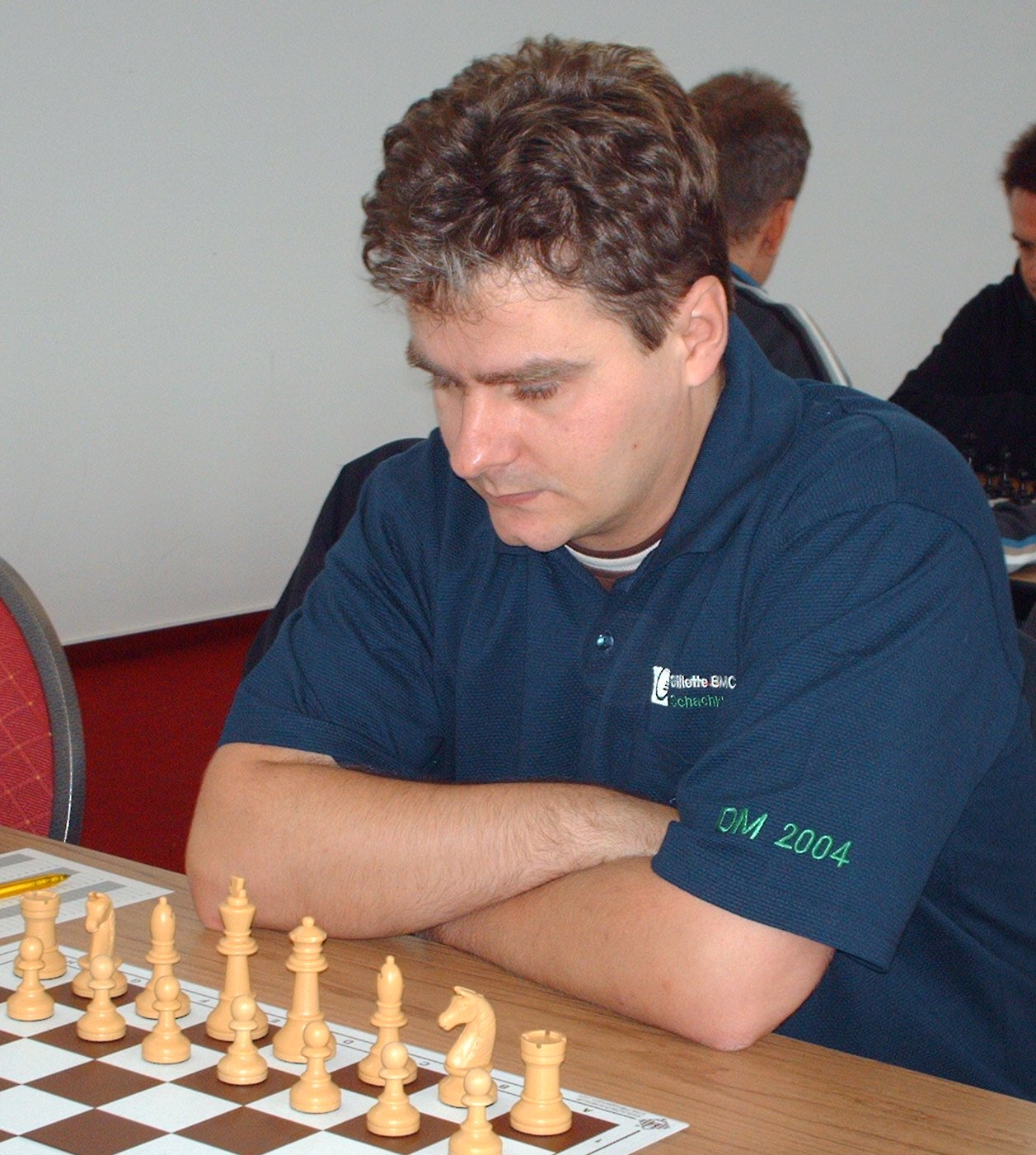 Roman Slobodjan bei der 6. Deutschen Betriebsschach-Mannschaftsmeisterschaft am 7. Oktober 2006 in Berlin